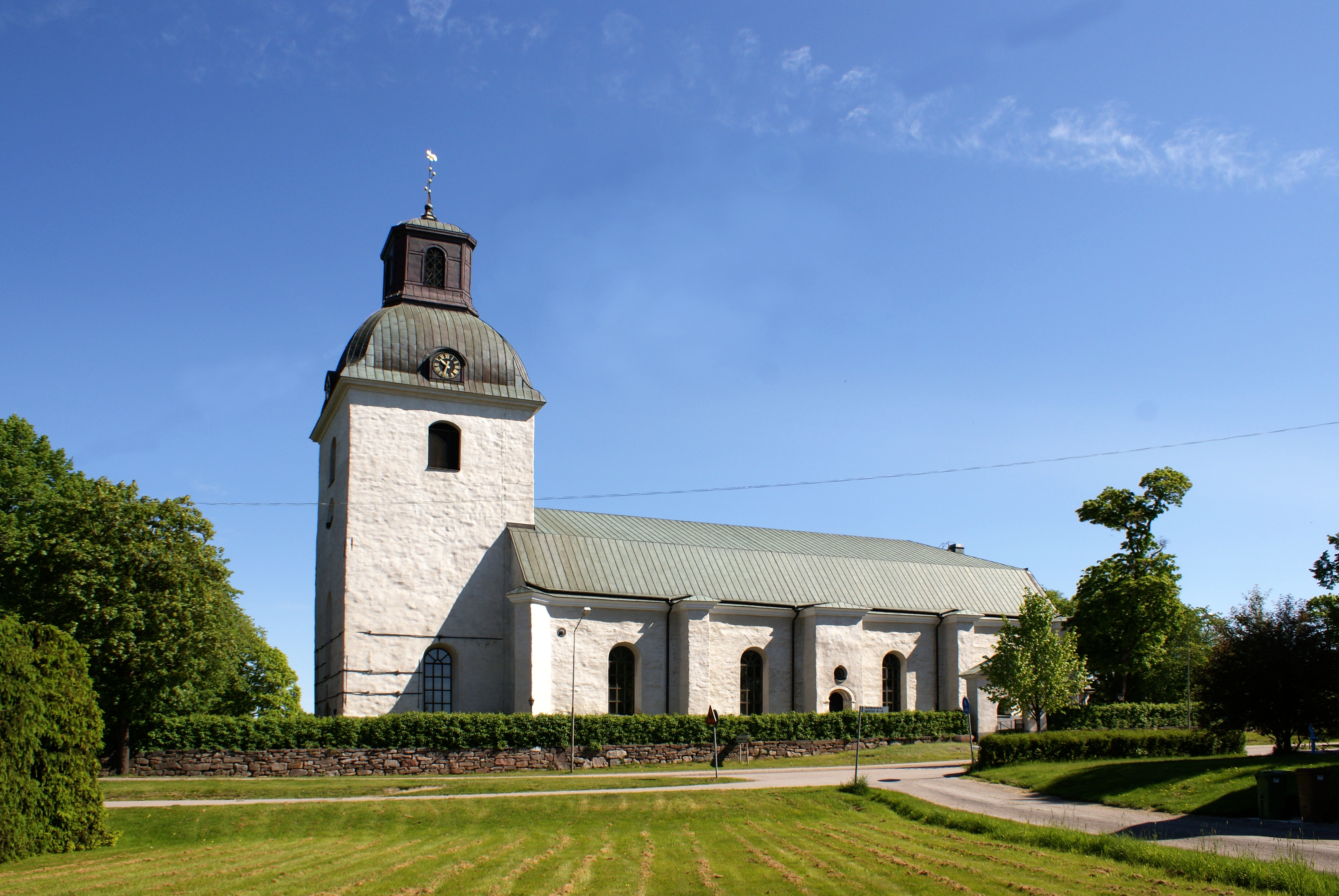 Ovansjö kyrka